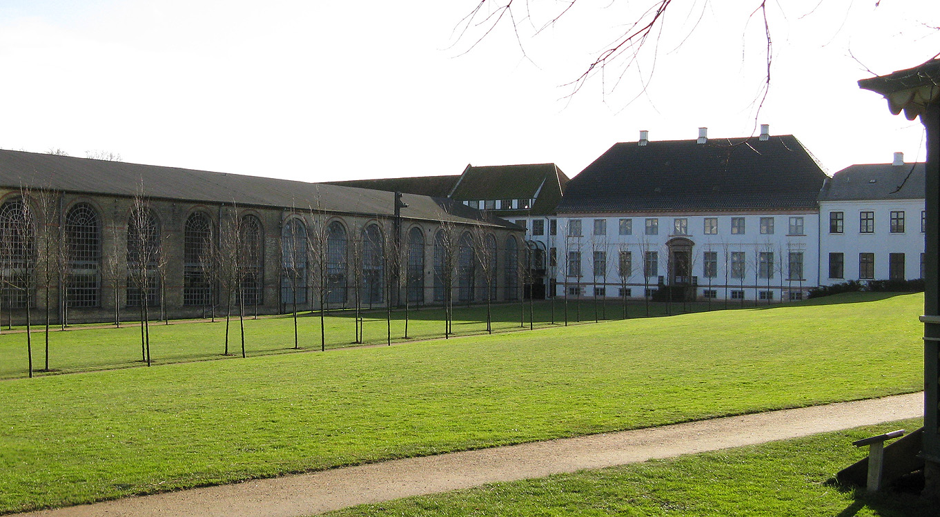 Industrianlæget Brede Værk, Hovedbygning